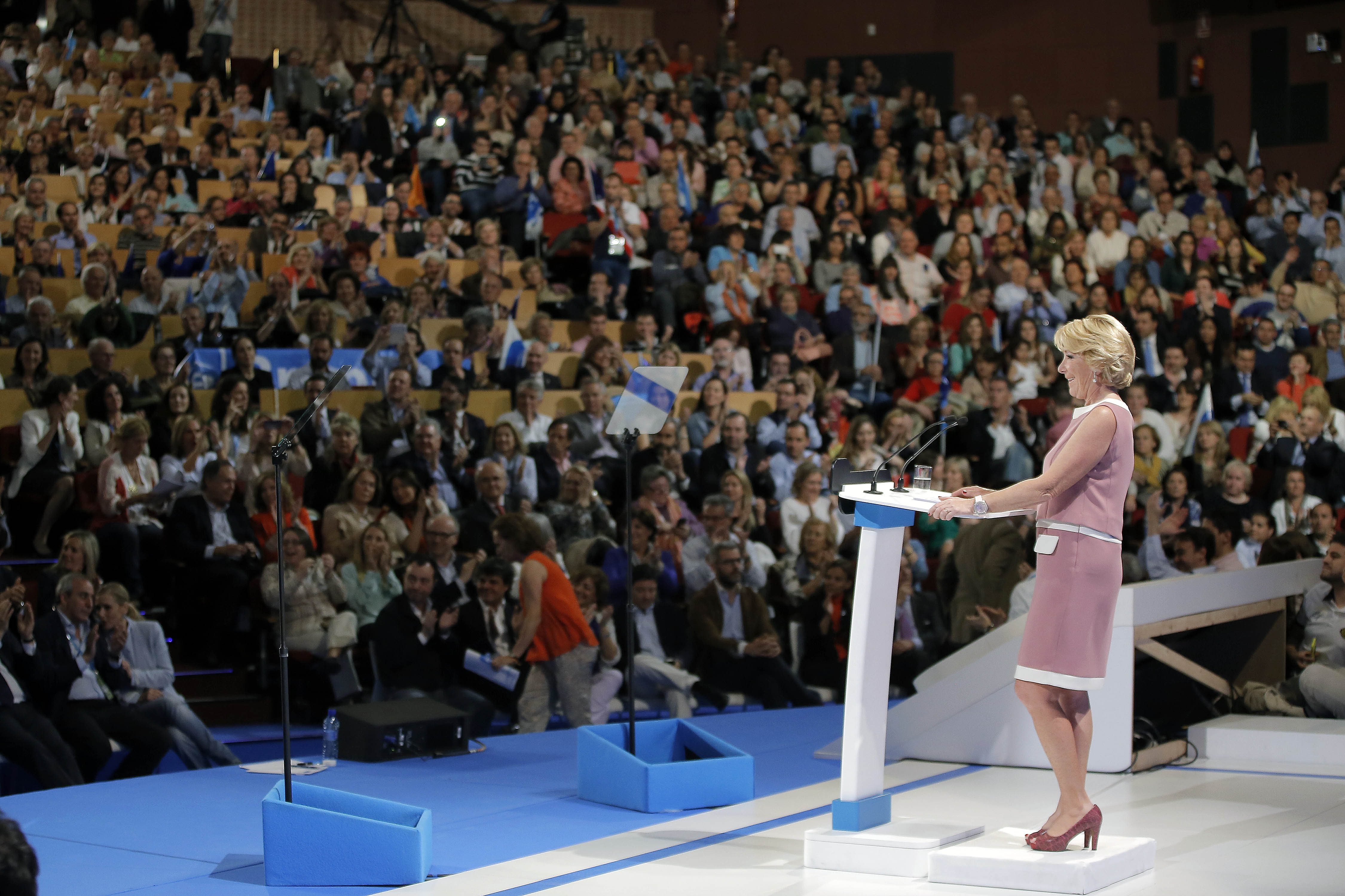 Cierre de campaña de las europeas de 2014 del PP